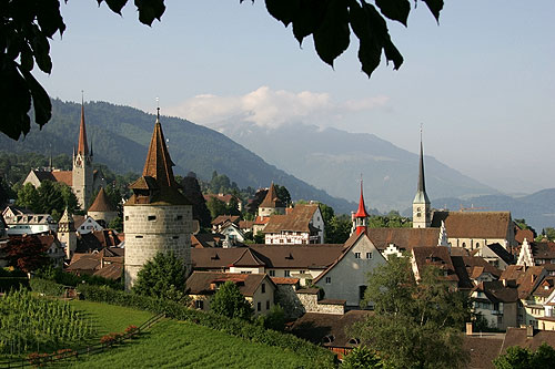 Zug vom Guggi aus gesehen